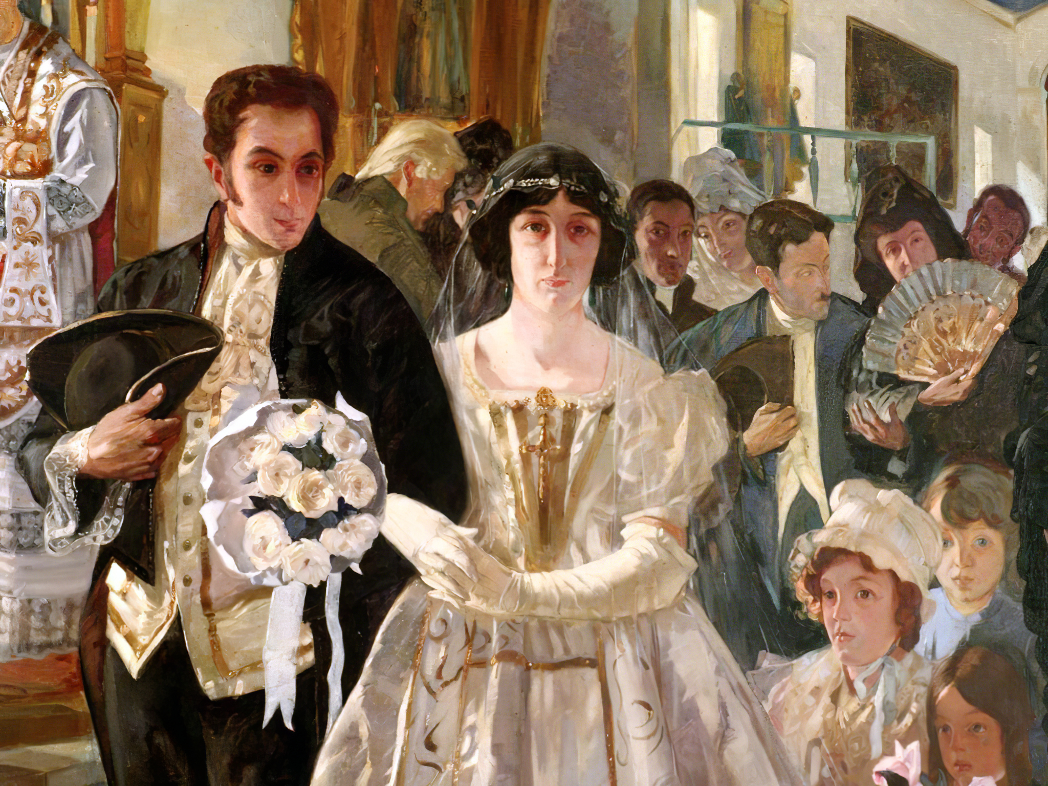 Cuadro que ilustra el matrimonio de Simón Bolívar Palacios y María Teresa del Toro. Esta fotografía fue tomada en el municipio colombiano con código 47001.